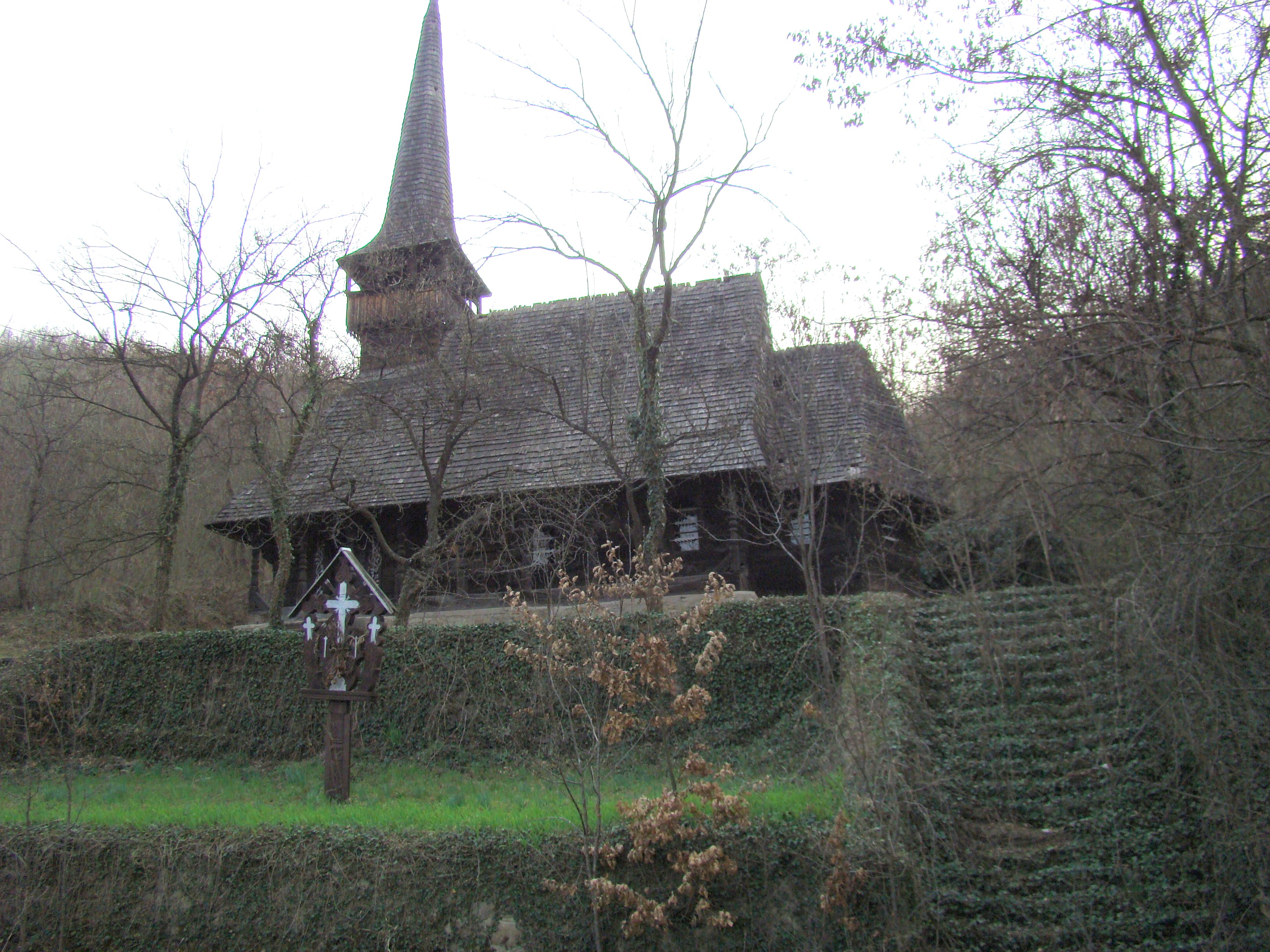 Biserica de lemn „Sf.Varvara” din Ticu-Colonie, județul Cluj